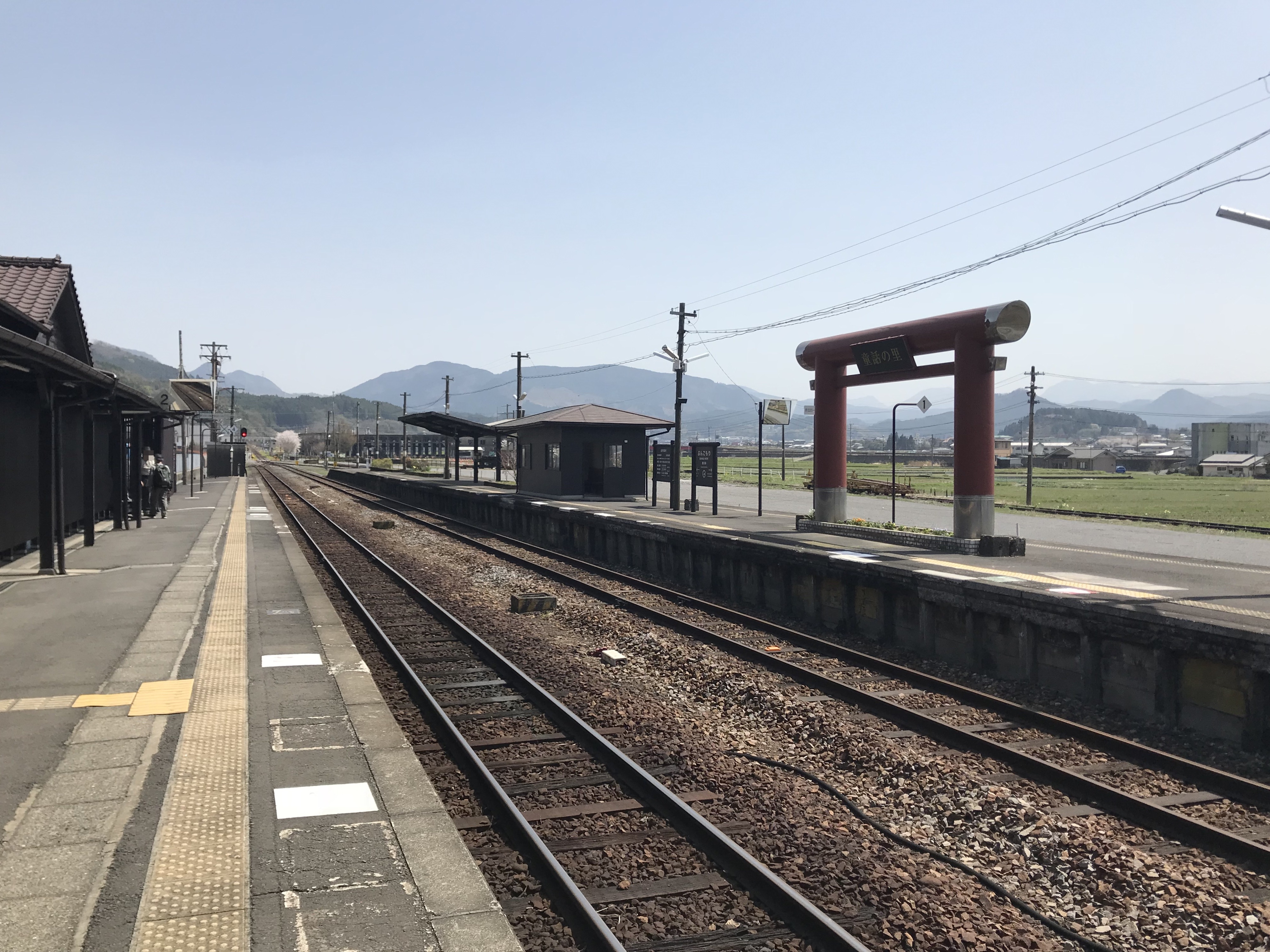 豊後森駅のホーム(奥は恵良方面)